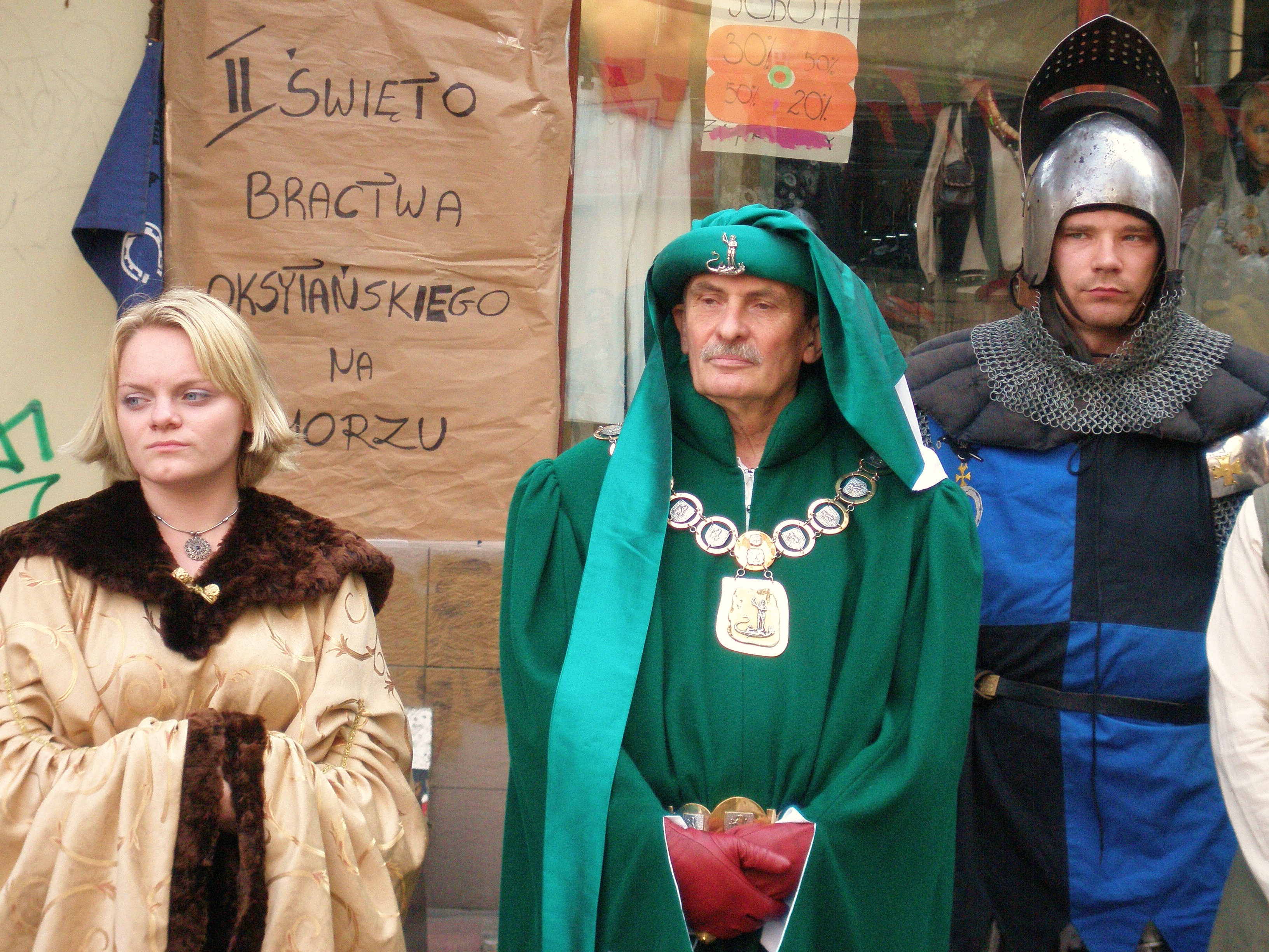 Hetman Wielki Rycerstwa Polskiego - Tadeusz Antoni Pagiński.